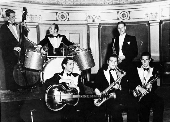 Svein Øvergaard’s orkester i Oslo, 1939. Fra venstre: Fred Lange-Nielsen, Per Gregersen, Finn Westbye, Arvid Gram Paulsen, Svein Øvergaard og Einar Gustavsen.